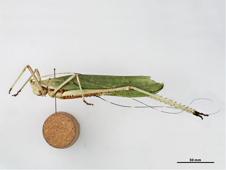 Segestidea novaeguineae male